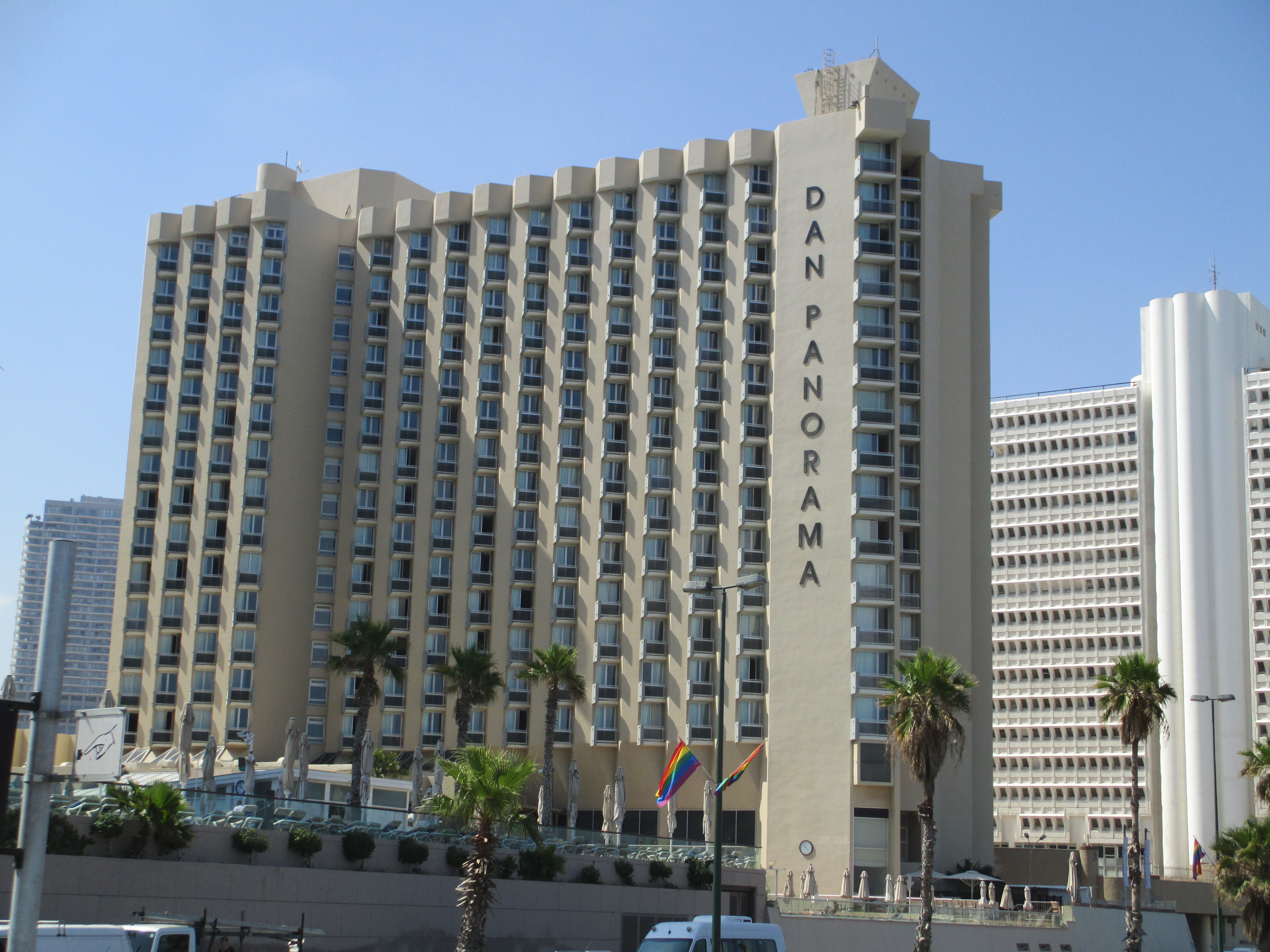 מלון דן פנורמה בתל אביב